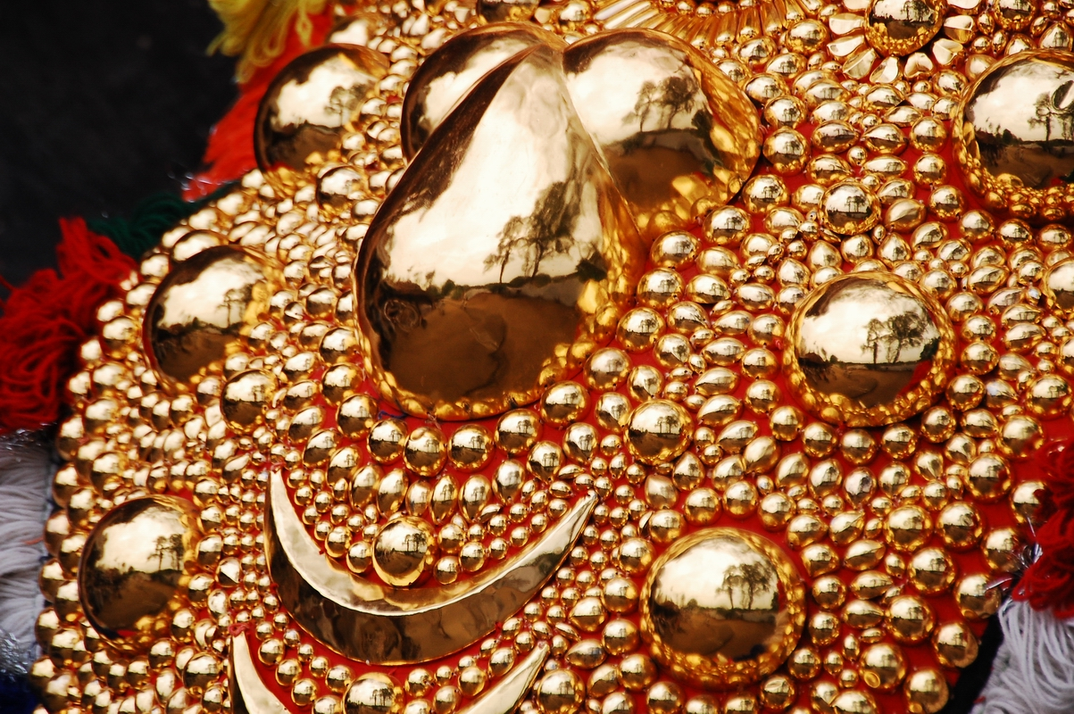 നെറ്റിപ്പട്ടത്തിലെ അലങ്കാരപ്പണികൾ